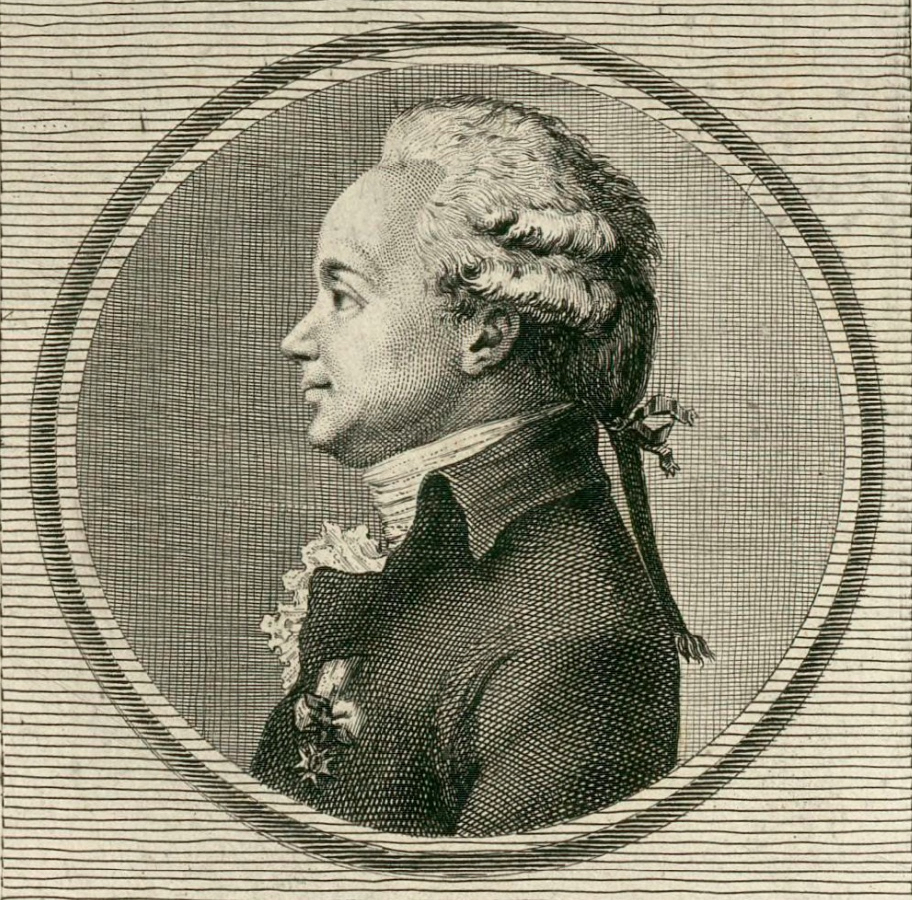 La Blache, Alexandre-Joseph Falcoz de (1739-1799)